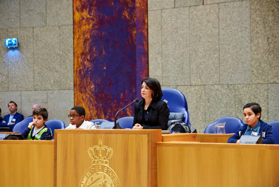 Khadija Arib op de plek van tweede kamer voorzitter tijdens de nieuweledendag van de PvdA